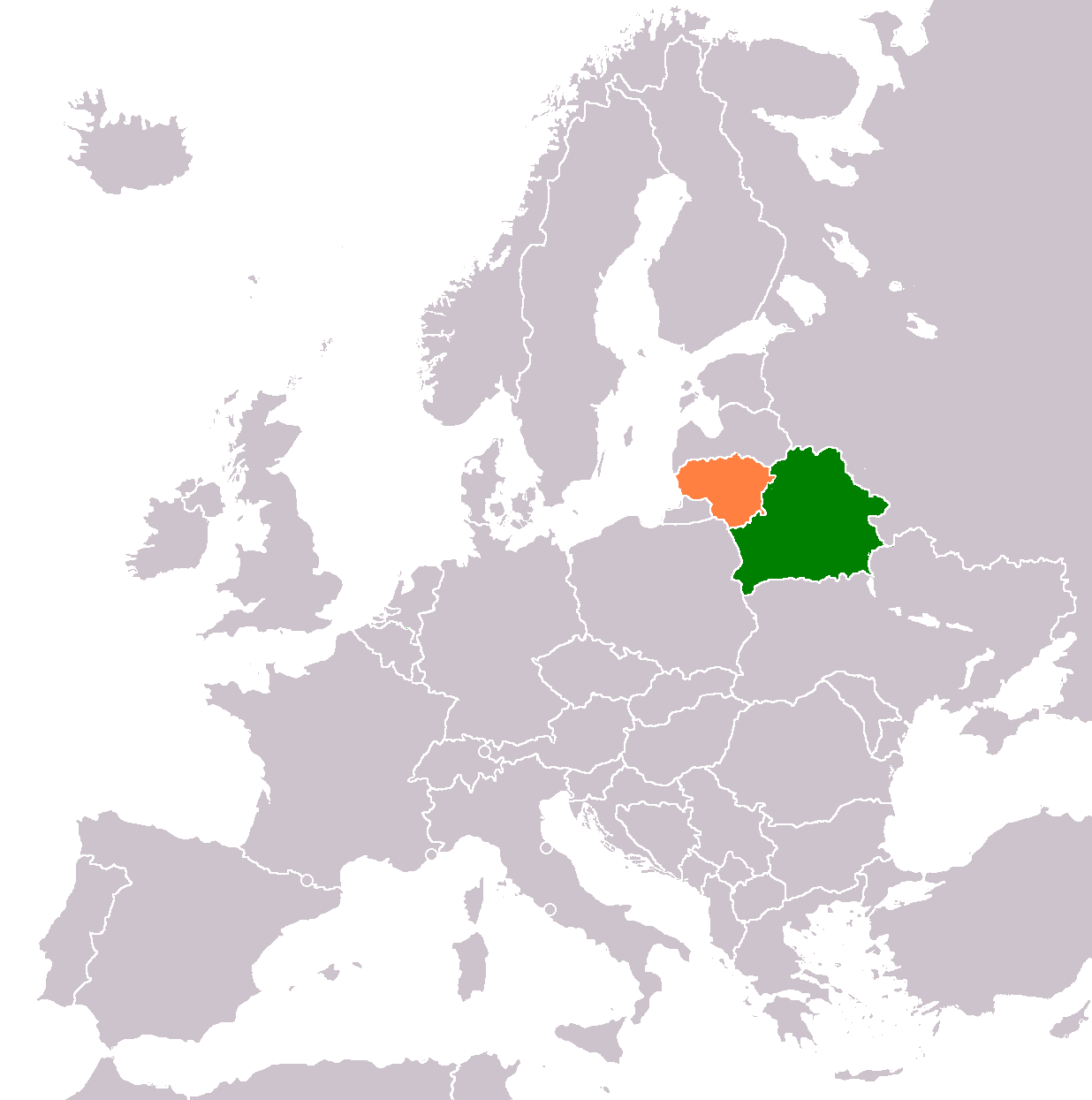 Belarus-Lithuania locator map.